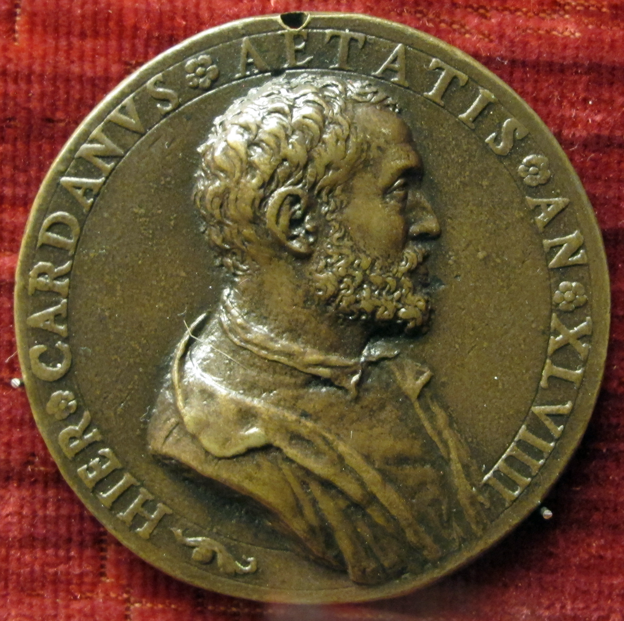 Medaglia di Girolamo Cardano